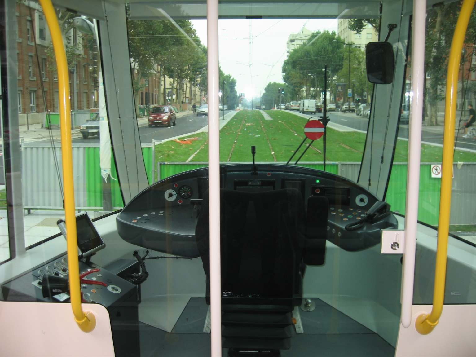 Journées du patrimoine RATP 16-17/09/2006. Cabine de conduite du T3 Parisien (Citadis 402).